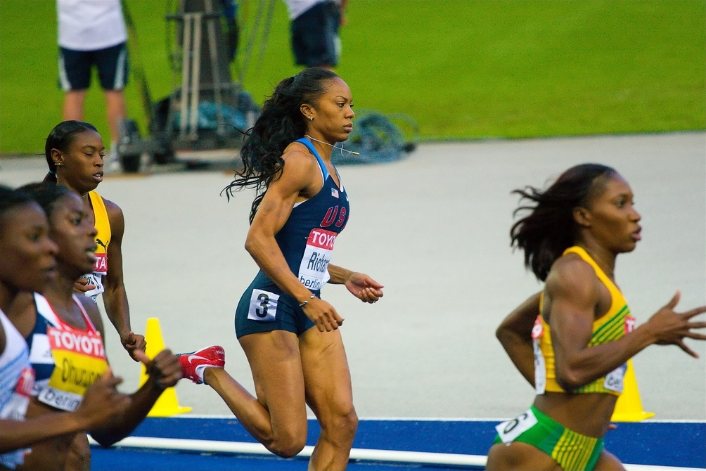 Sanya Richards während ihres Finallaufes